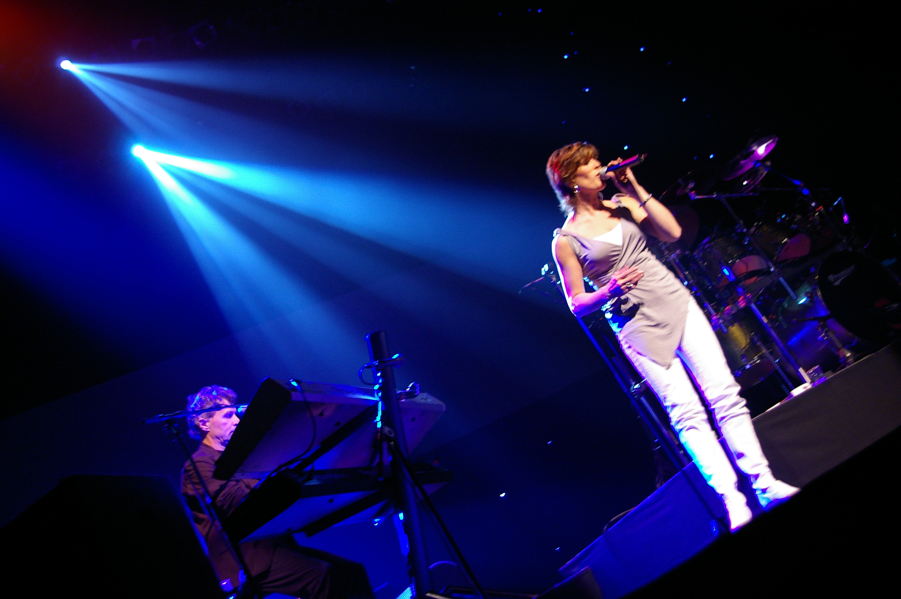 Carola Smit met BZN in concert in De Tamboer te Hoogeveen